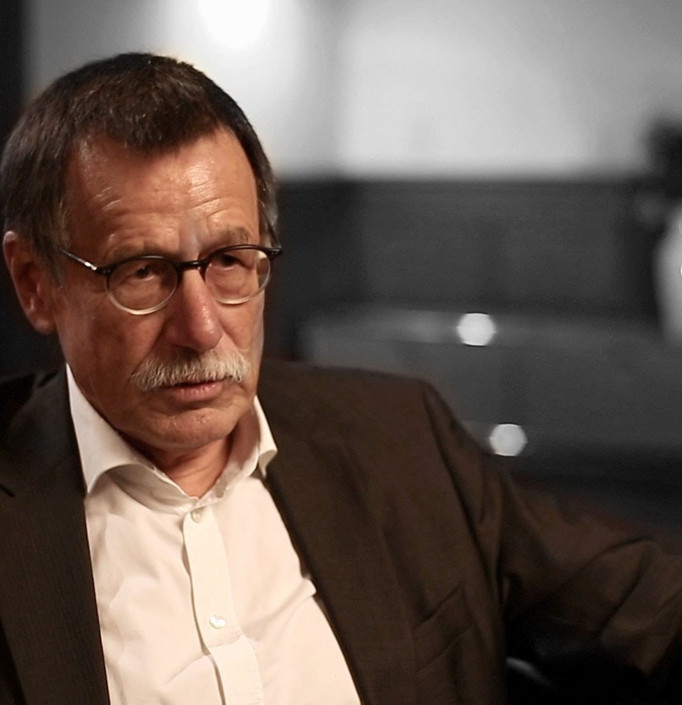 Was man nicht im Kopf hat, muss man halt im digitalen Speicher haben. Was heißt das fürs Lernen? Da muss man ganz neue Wege gehen, meint Friedrich W. Hesse von der Universität Tübingen. Und wirft eine spannende Frage auf: Wann ist man künftig eigentlich Experte, wenn das mühsam angesammelte Kopf-Wissen weniger zählt? Weitere Videos zum Thema: Sönke Knutzen: Freies Wissen gegen Googles Algorithmen Rolf Granow: Digitale Bildung - zukünftig ohne Lesen und Rechnen? Gunter Dueck: Zur Digitalisierung der Bildung Jede Woche neu beim Stifterverband: Die Zukunftsmacher und ihre Visionen für Bildung und Ausbildung, Forschung und Technik Produktion: Corina Niebuhr, Webclip Medien Berlin für den Bildungskanal des Stifterverbandes